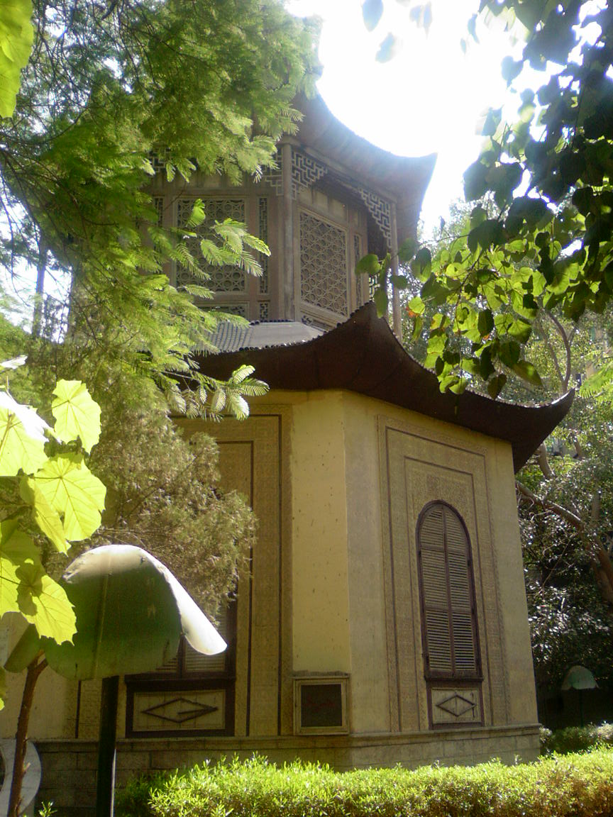 الكشك الياباني بحديقة الحيوانات بالجيزة